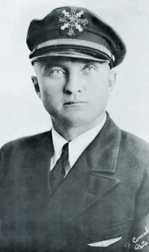 Steponas Darius (1930)